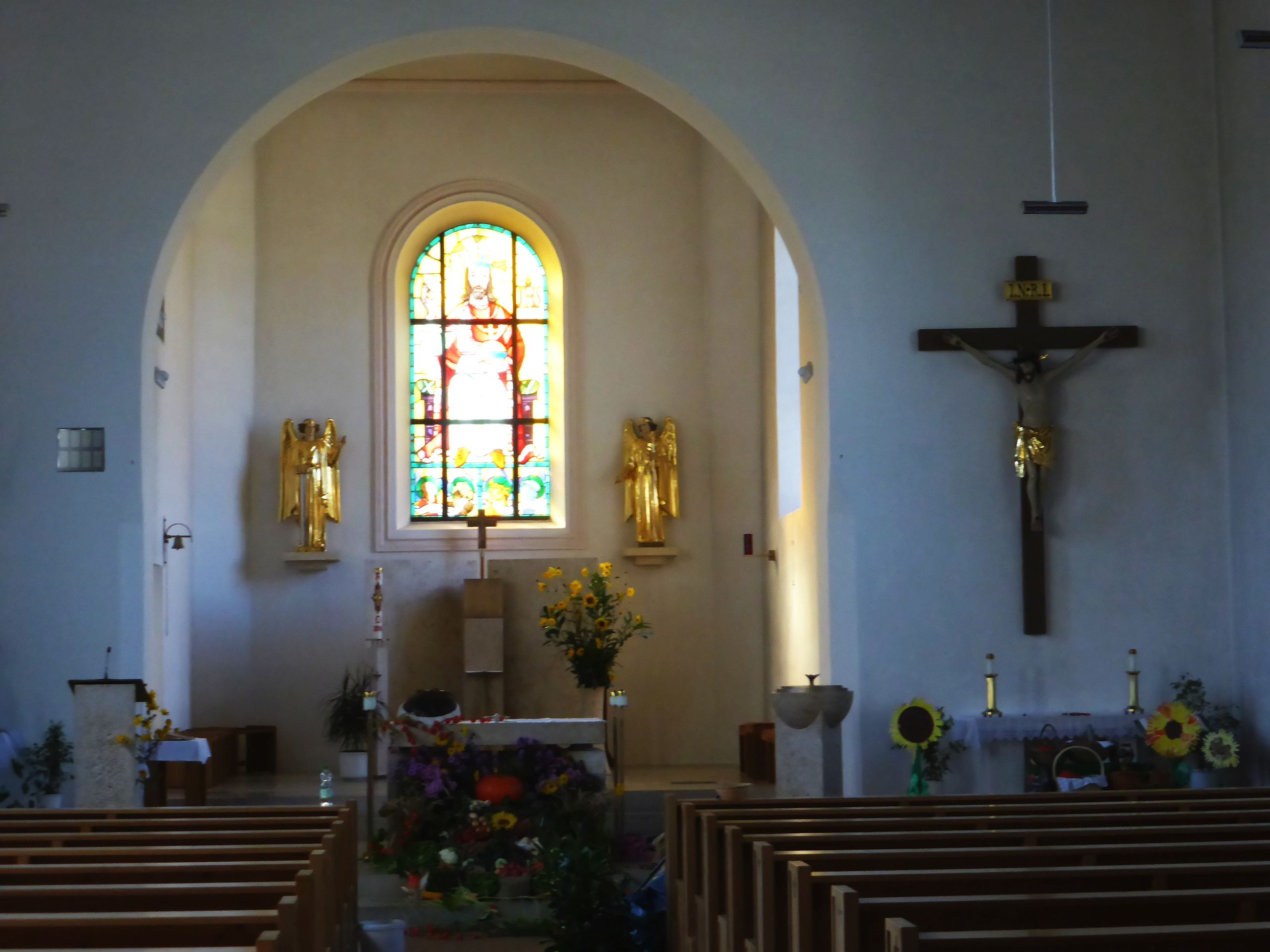 Wolfsegg